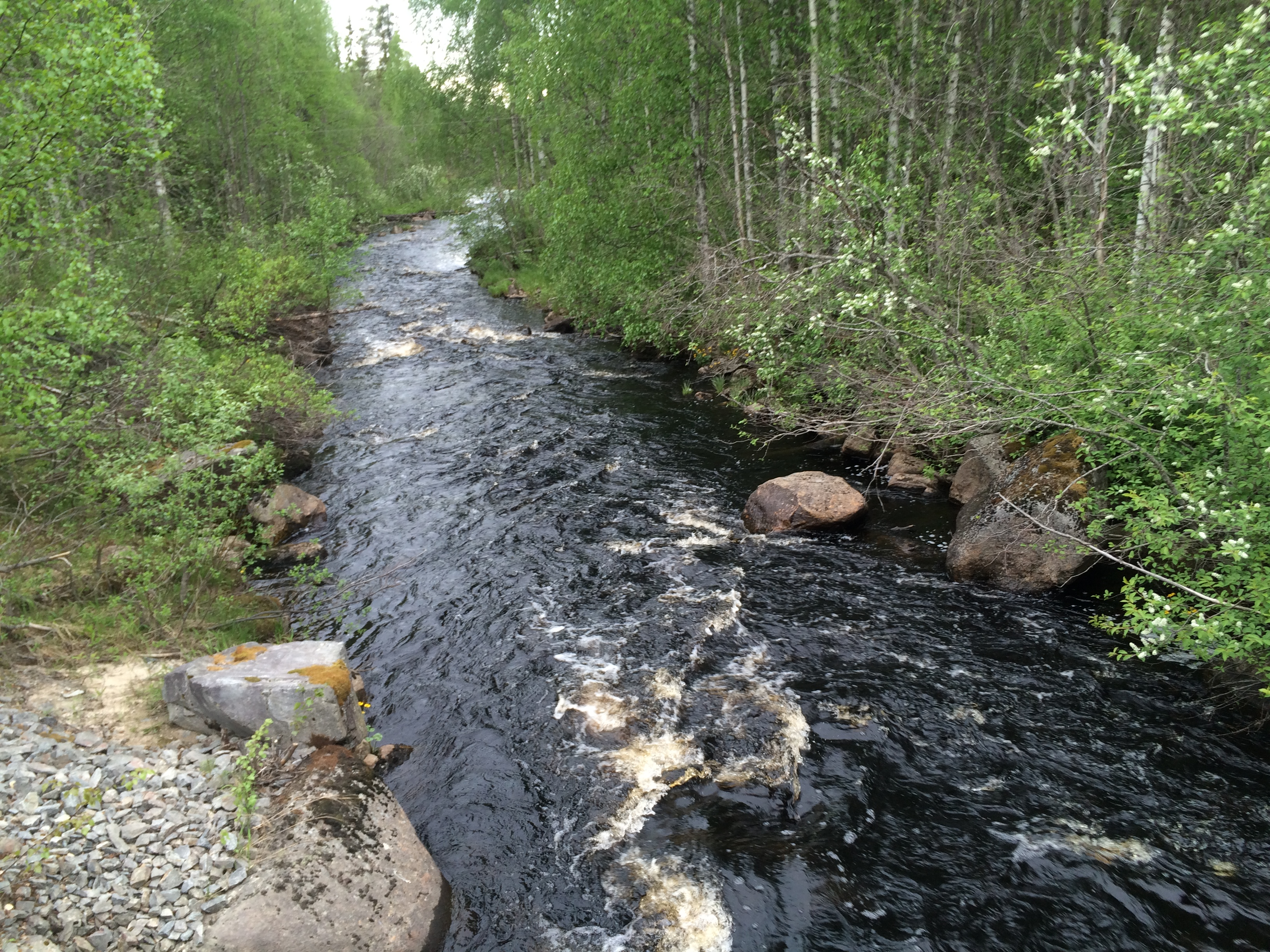 Лузингилакши